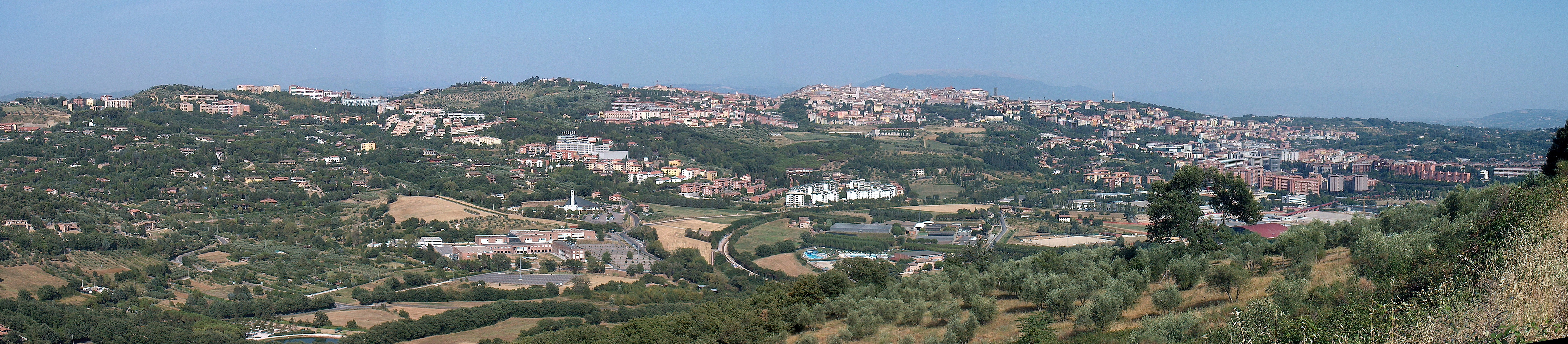 Panorama di Perugia ripreso dalla "Città della Domenica", foto di Riccardo Cesarini, luglio 2007